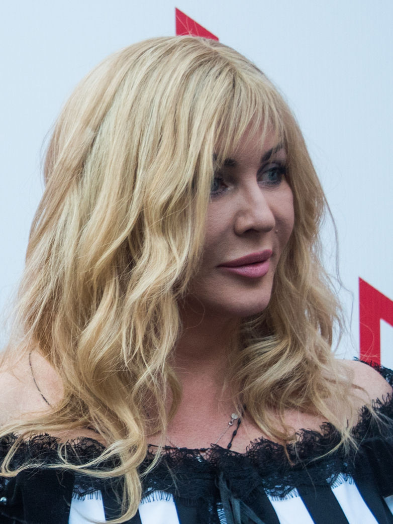 Аслан Ахмадов и Ирина Билык на фестивале «Лайма. Рандеву. Юрмала 2017»